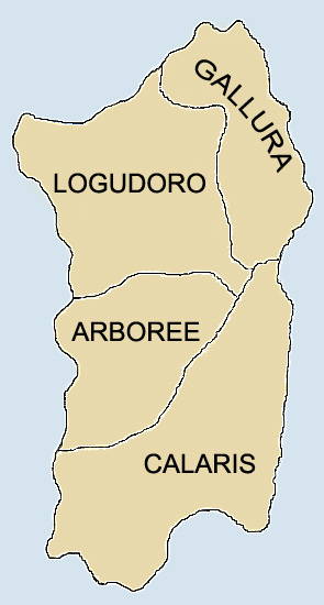 Auteur:Yugiz Cette image représente les quatre Judicats de Sardaigne.